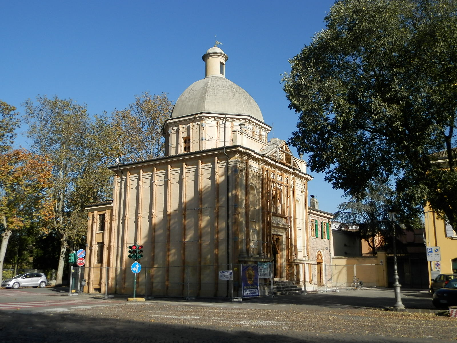 Fotografia che ritrae la "chiesa della Madonnina" dopo i lavori di messa in sicurezza da parte dei Vigili del Fuoco